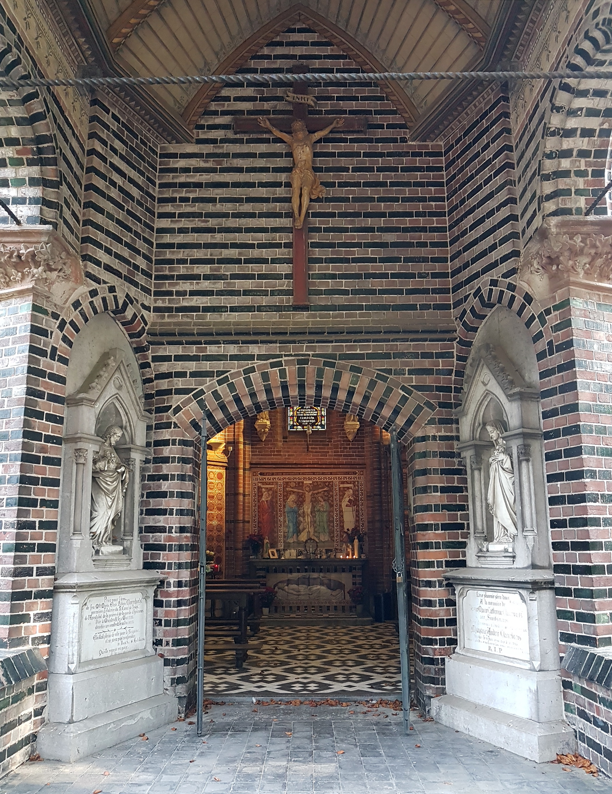 Portaal van de neogotische kapel (Joh. Kayser, 1885-90) op de Algemene Begraafplaats Tongerseweg in Maastricht.